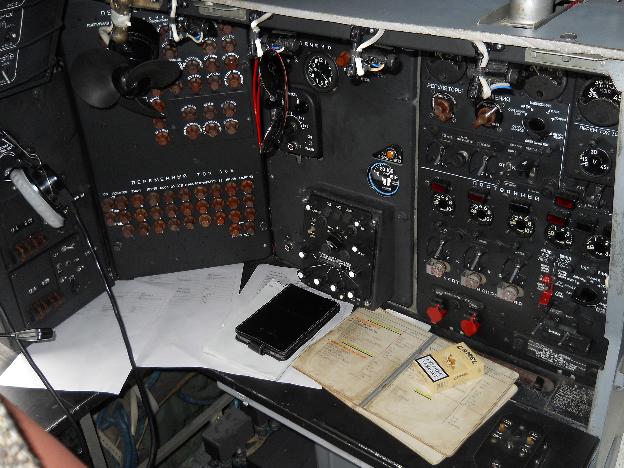 Рабочее место радиста самолёта Ан-26